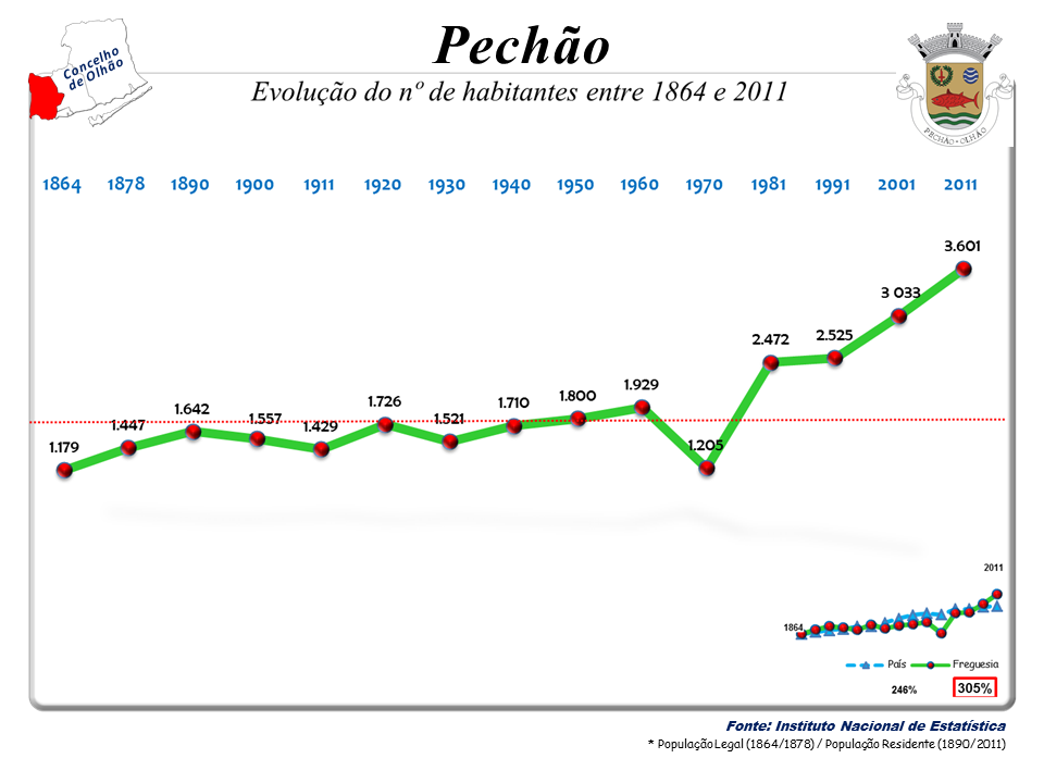 Cenos 1864/2011